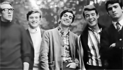 Los Sírex en 1965